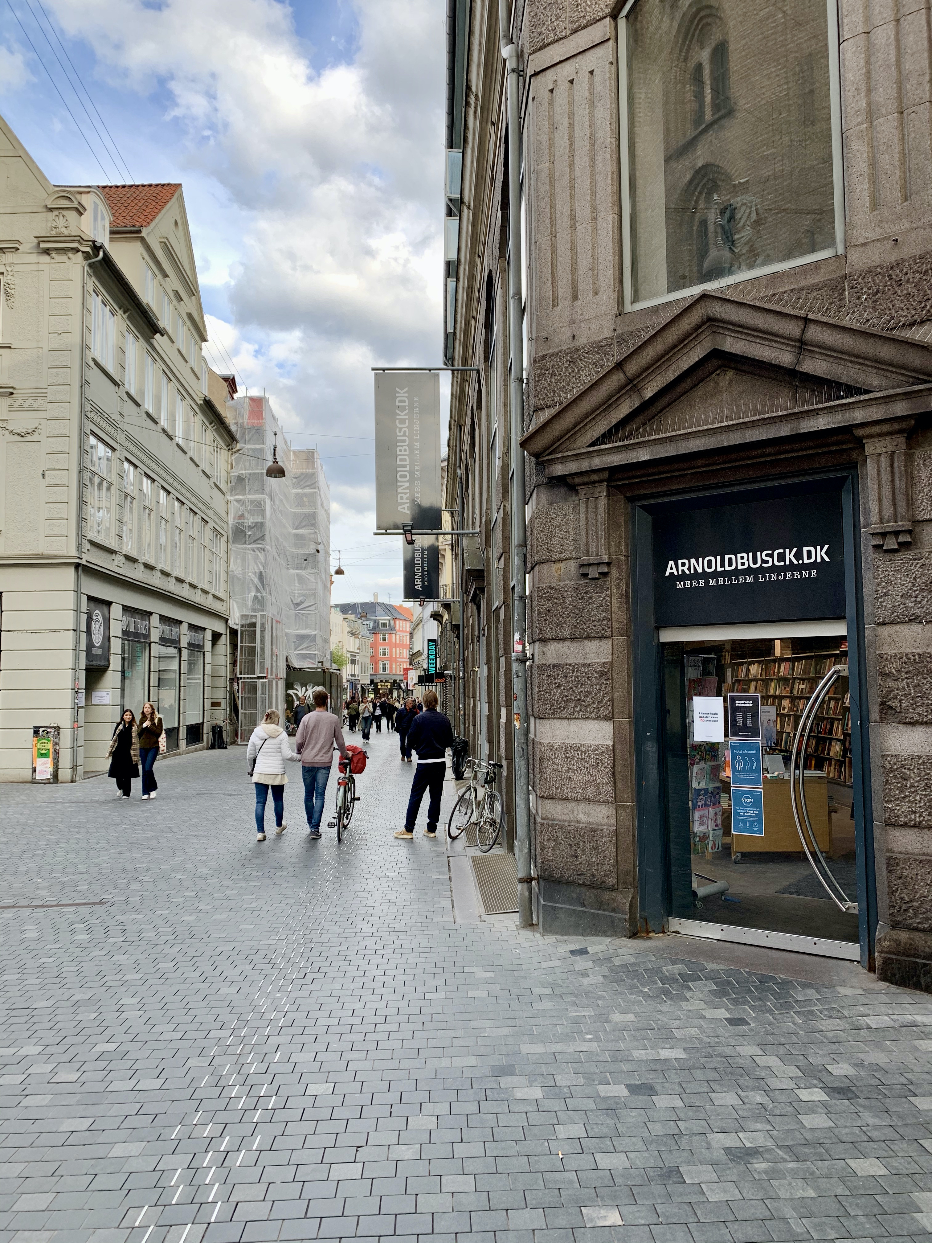 Arnold Busck boghandel i Købmagergade